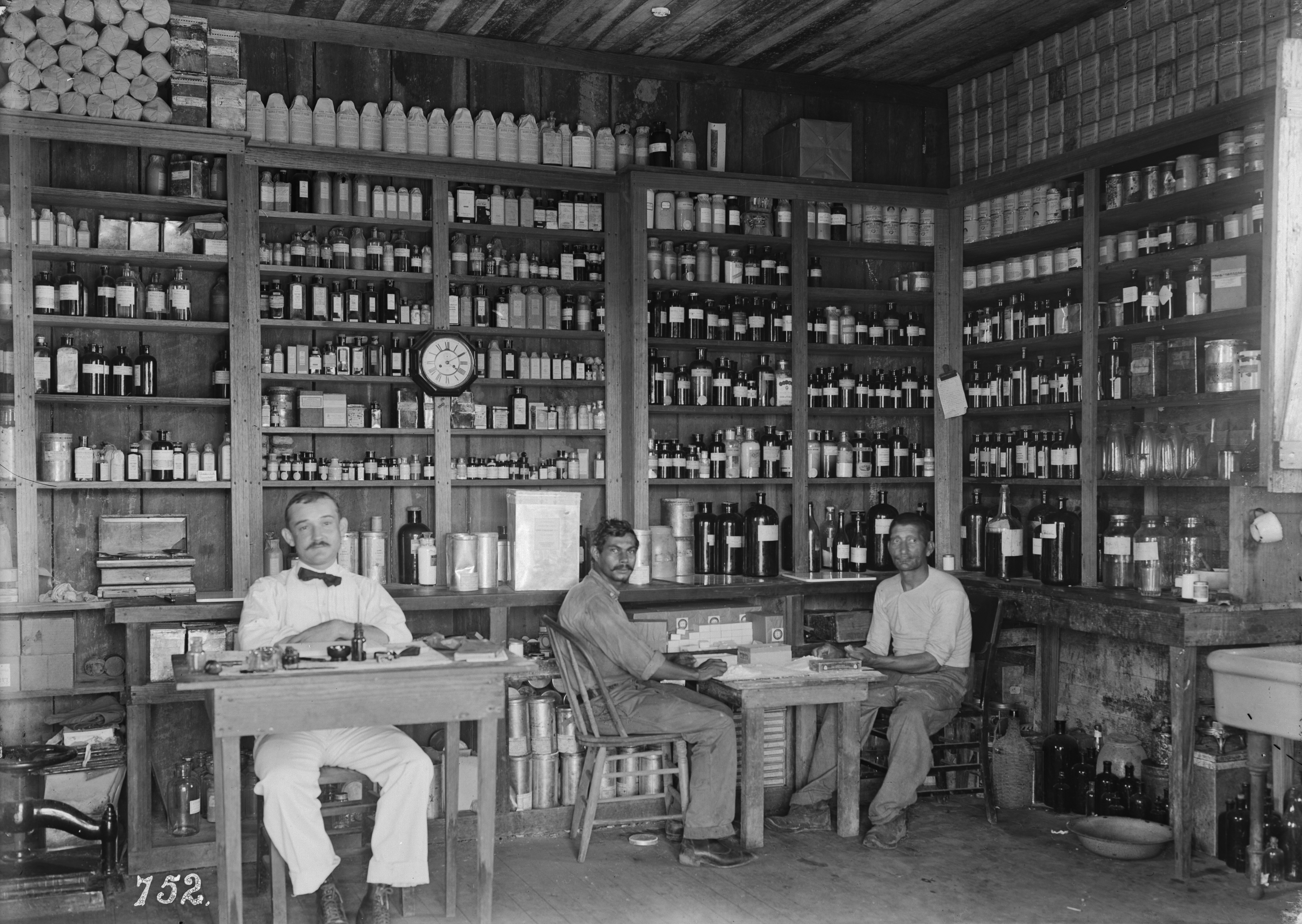 Obra que integra o acervo do Museu Paulista da USP. Coleção Dana Merrill.